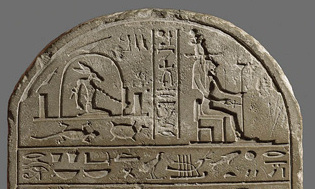 Cintre de la stèle magique du Musée Kestner à Hanovre. Seth est fait prisonnier dans son lieu d'exécution par la lionne Sekhmet